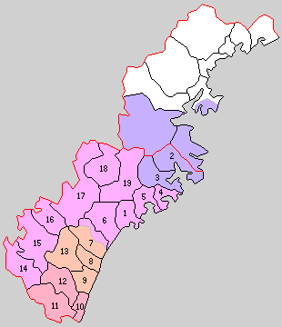 三重県南牟婁郡の町村制時点の町村。